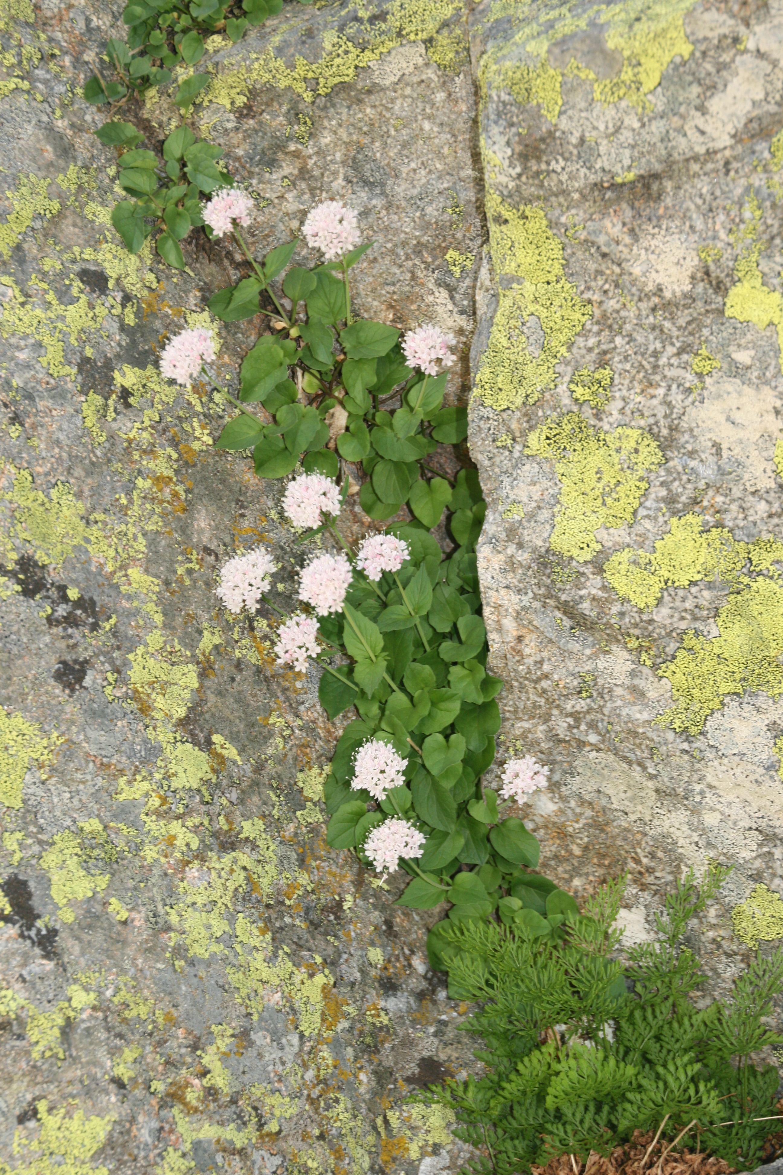 Flora en las inmediaciones de la Laguna Grande del Circo de Gredos en la Sierra de Gredos. España This is a photography of a Special Area of Conservation in Spain with the ID: ES4110002. Natura2000 entry, EEA entry